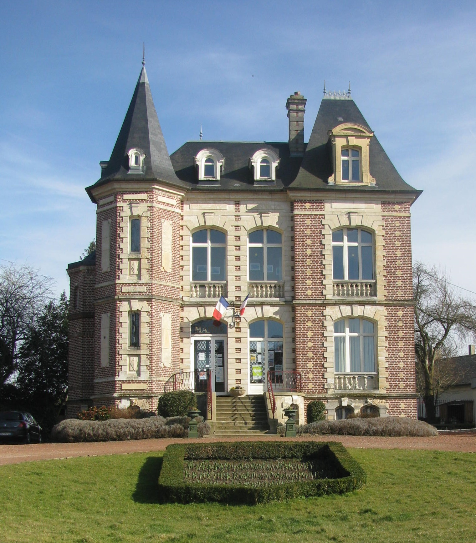 La mairie de Chepy.